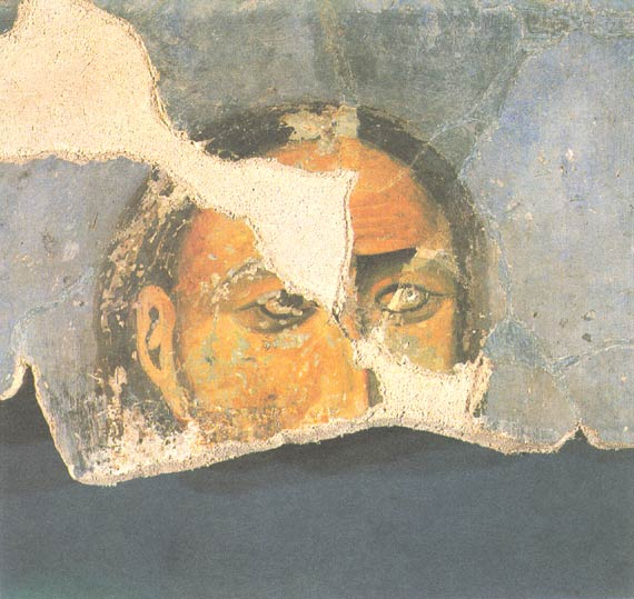 Prince Vukan Nemanjić of Duklja - Studenica Monastery